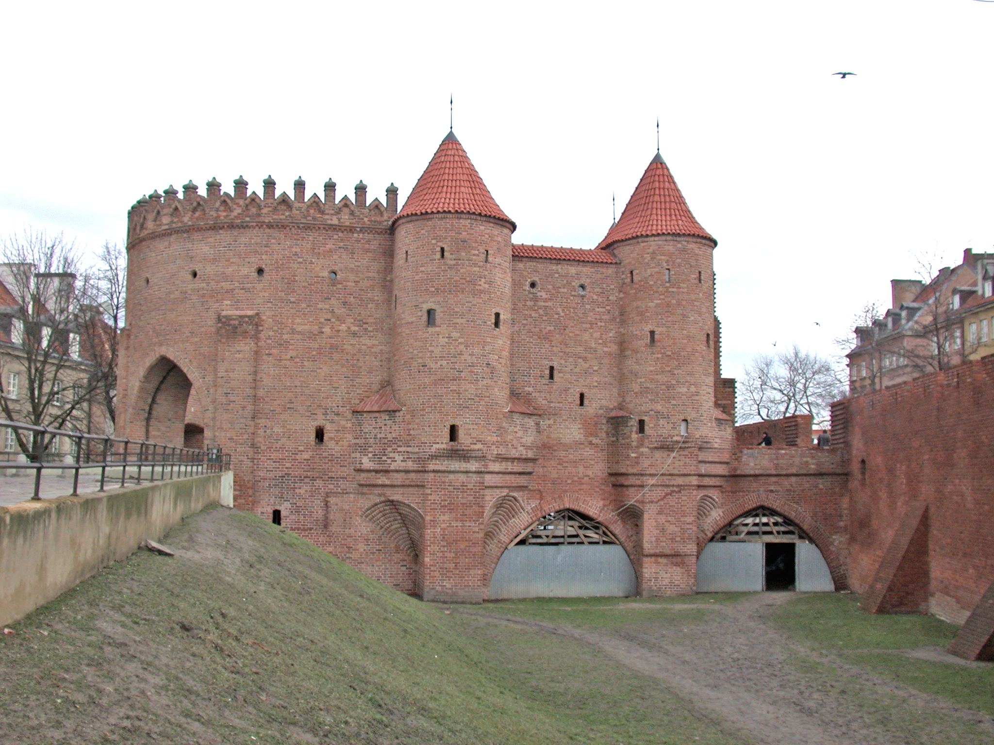 Varsavia, Barbacane (Barbakan), ingresso alla Città Vecchia (Stare Miasto), fianco destro da via Podwale.